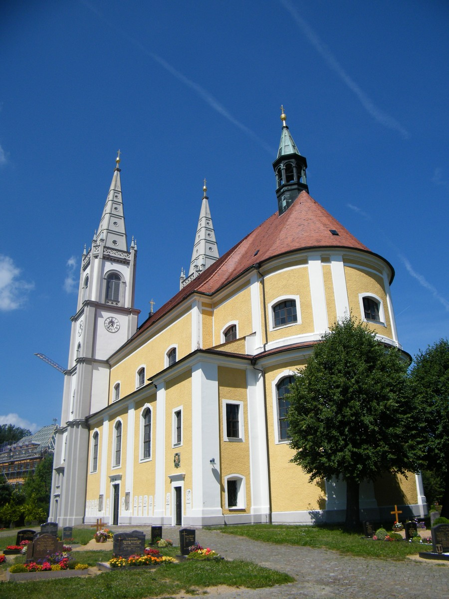 Kostel Nanebevzetí Panny Marie v Schirgiswalde